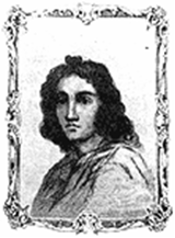 Grabado anónimo del cocinero François Vatel